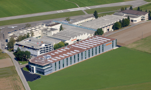 Luftaufnahme Daetwyler Hauptsitz